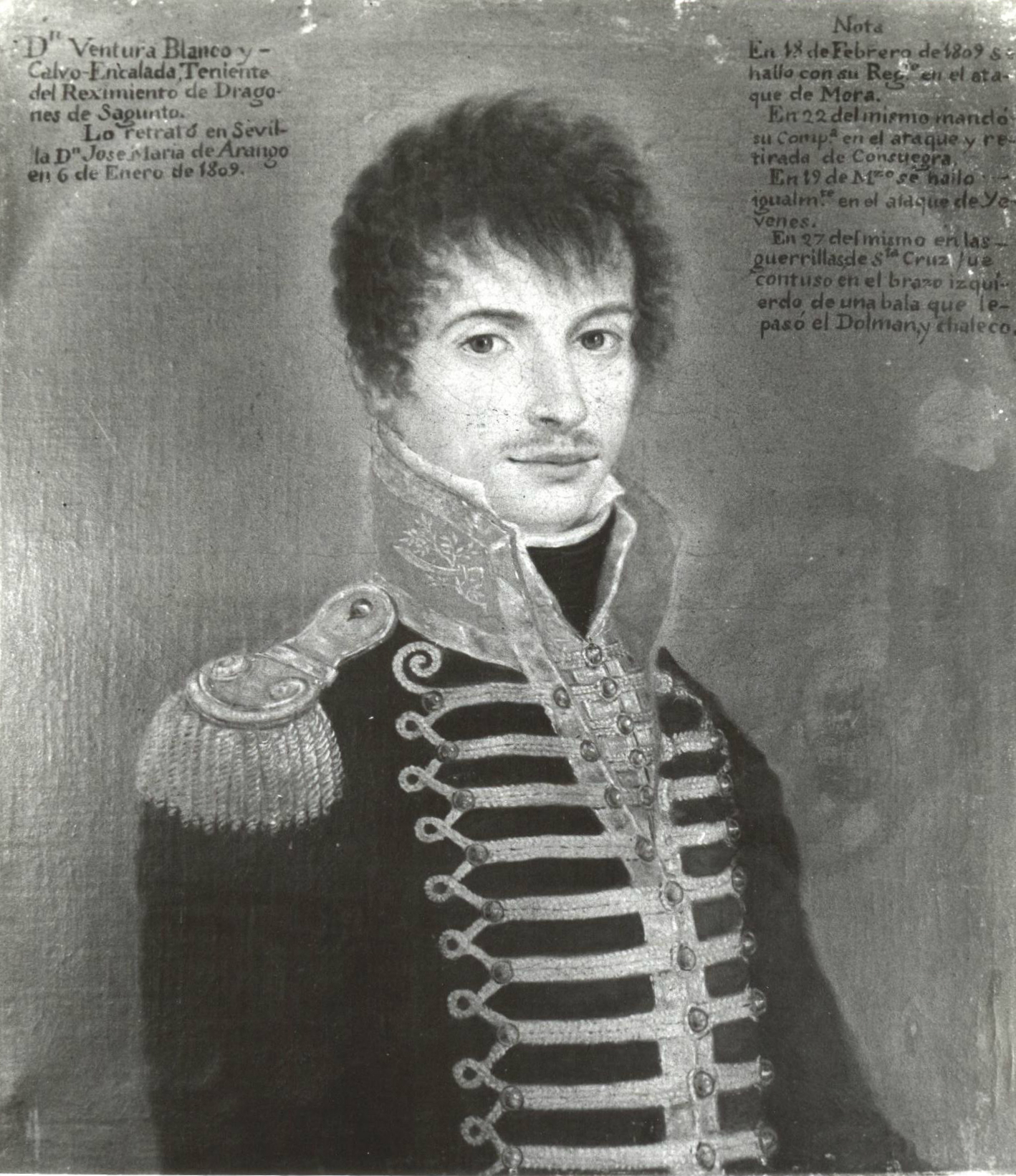 Ventura Blanco Encalada (Buenos Aires 1782 - Santiago; 19 de junio de 1856). Político y militar, que llegó a desempeñar cargos ministeriales en Chile.